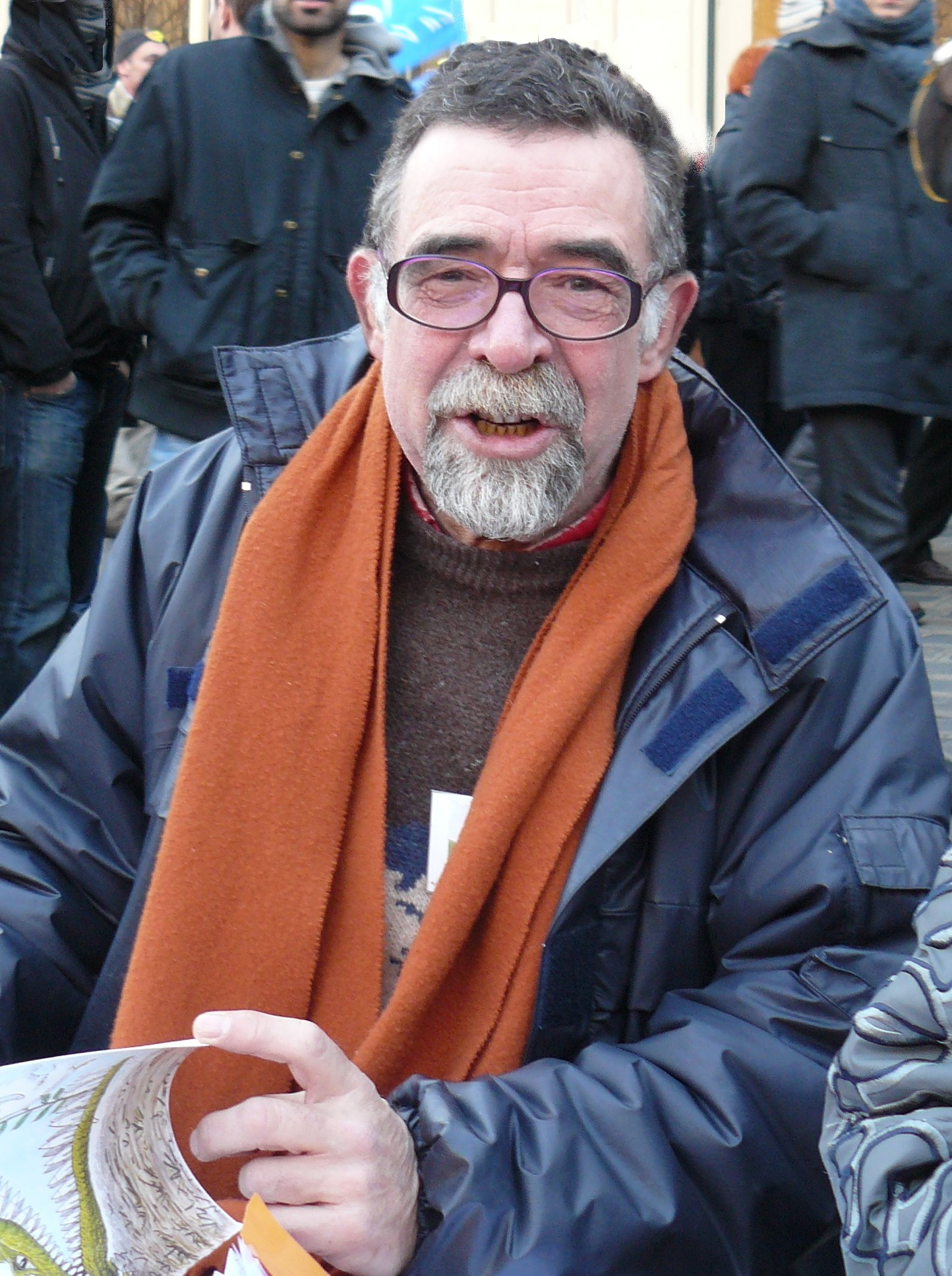 Le dessinateur de presse Jean-François Batellier lors de la manifestation du 29 janvier 2009 à Paris.